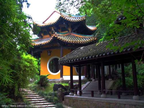 麓山寺碑亭